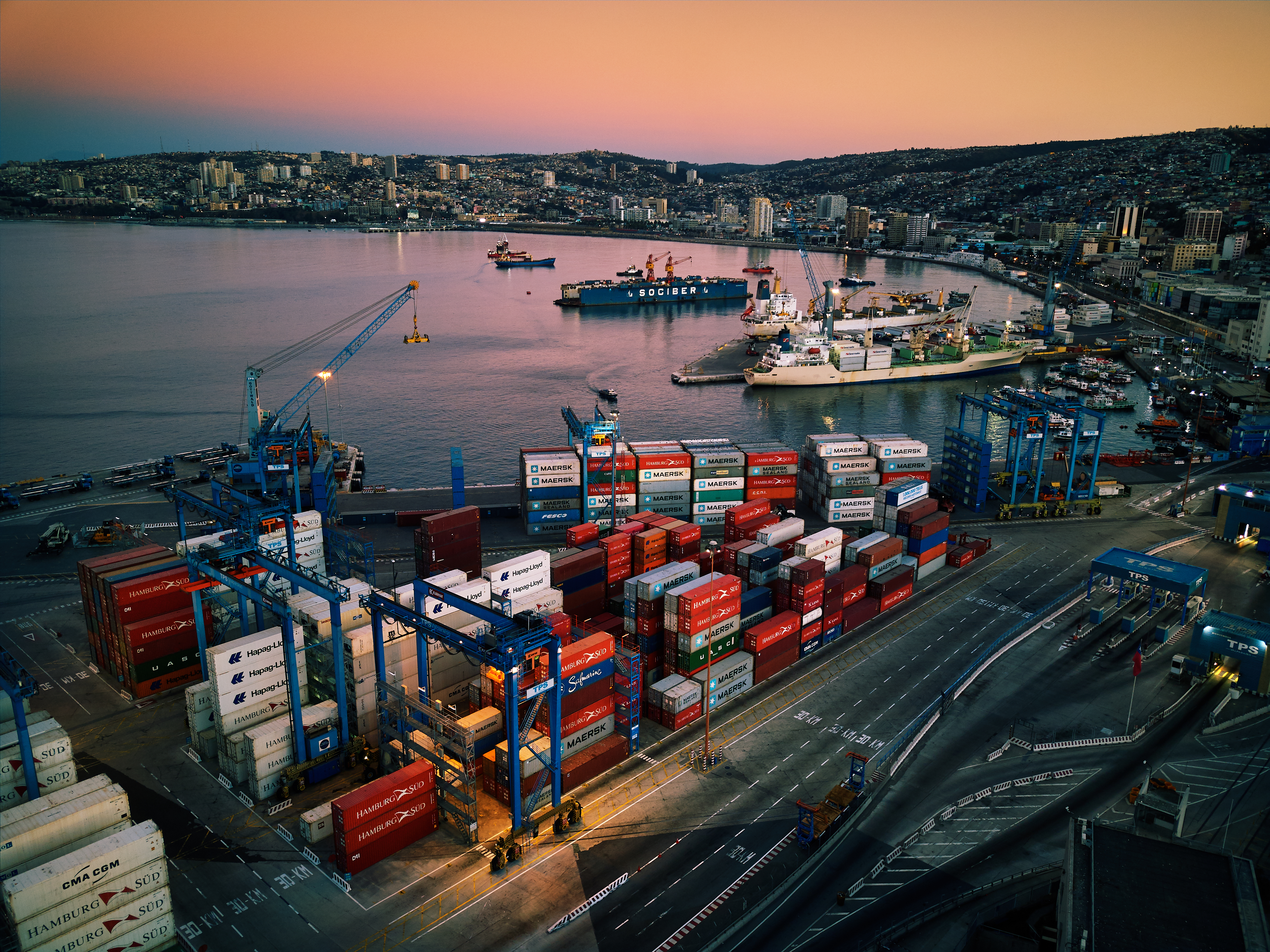 Valparaíso port